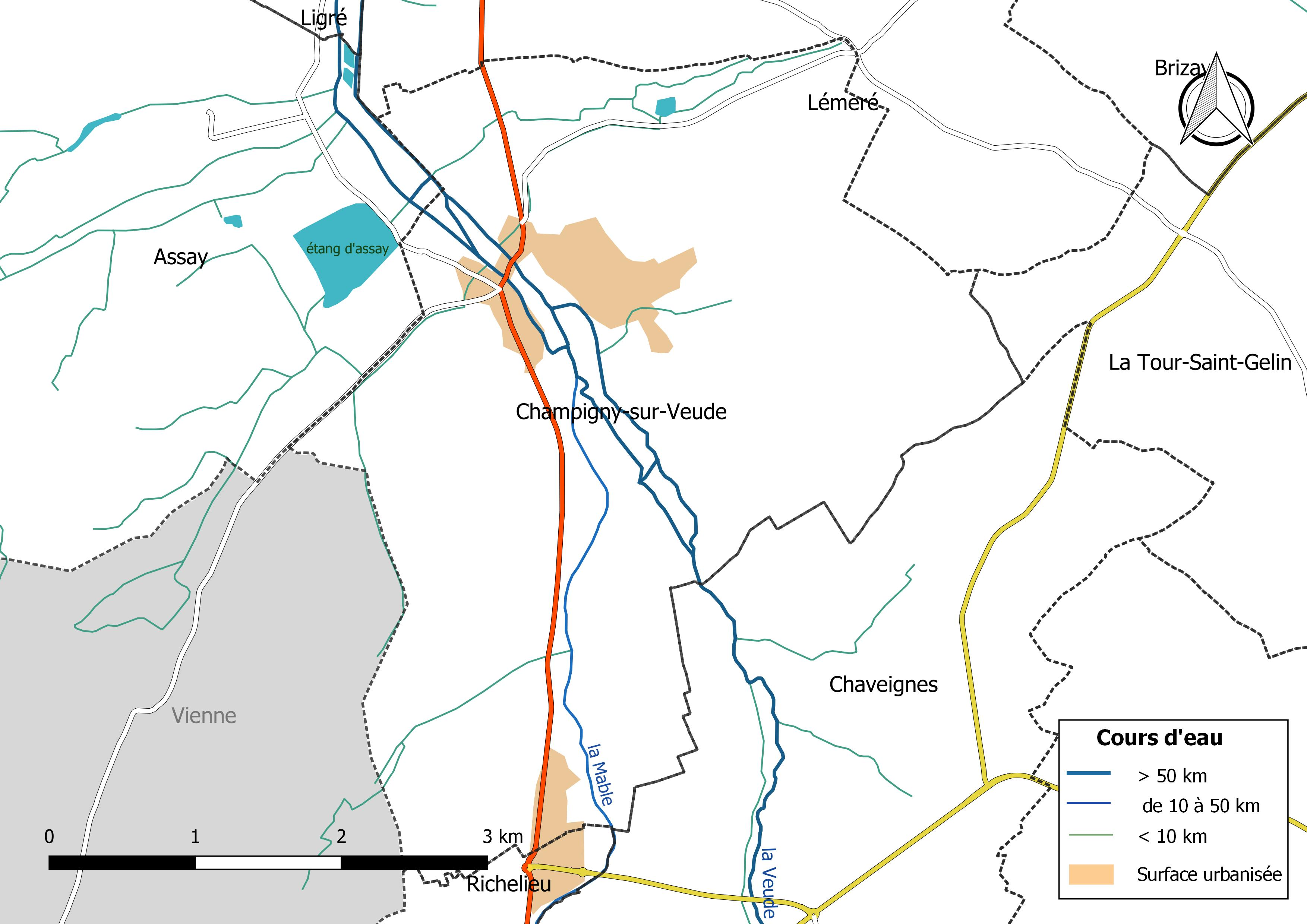 Carte du réseau hydrographique de la commune de Champigny-sur-Veude (France).